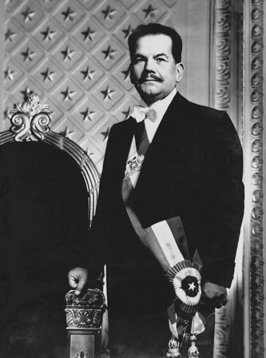 Fotografía oficial de Pedro Aguirre Cerda, Presidente de Chile (1938-1941), durante su mandato.